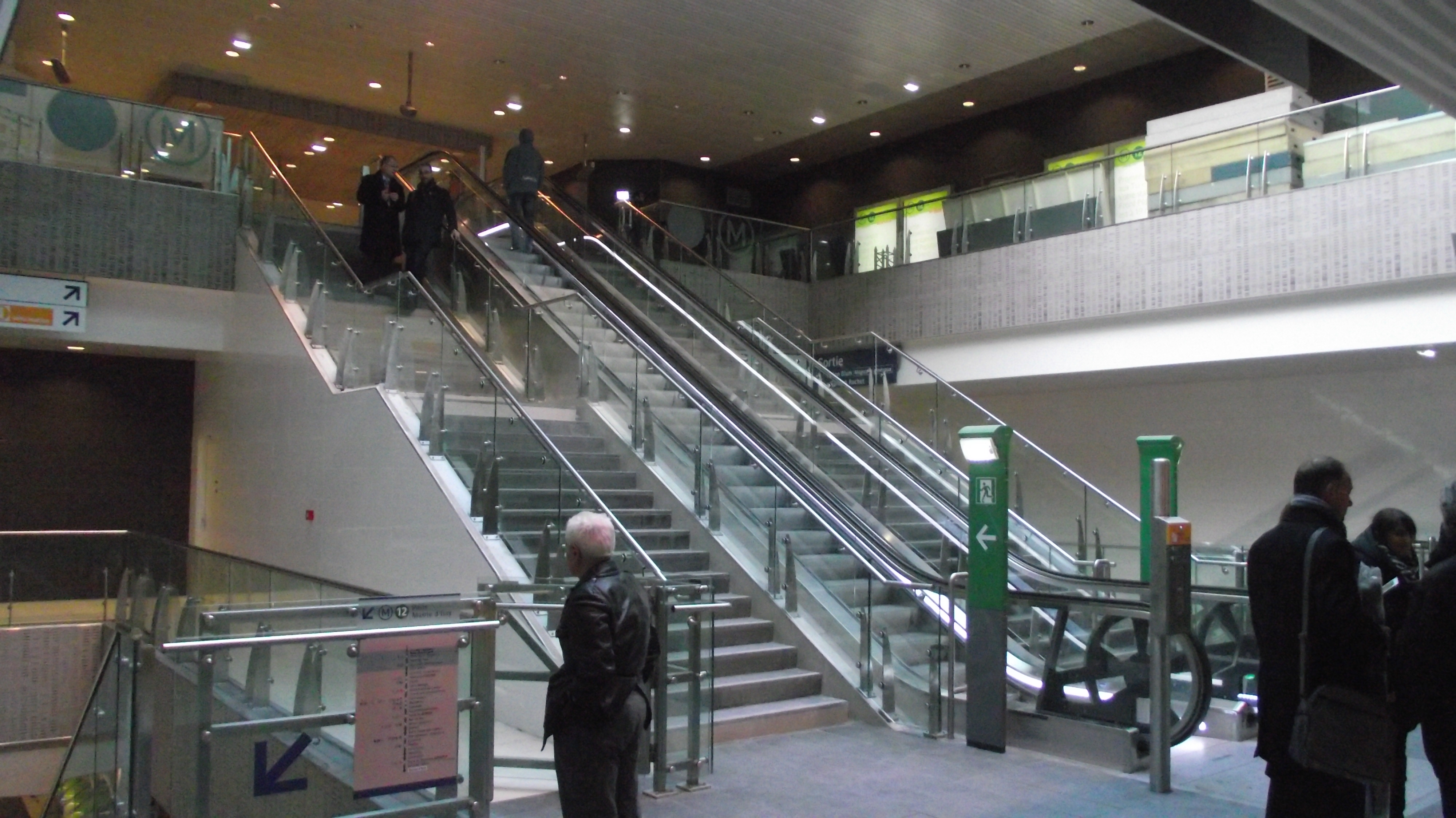 De roltrappen en trappen in het station